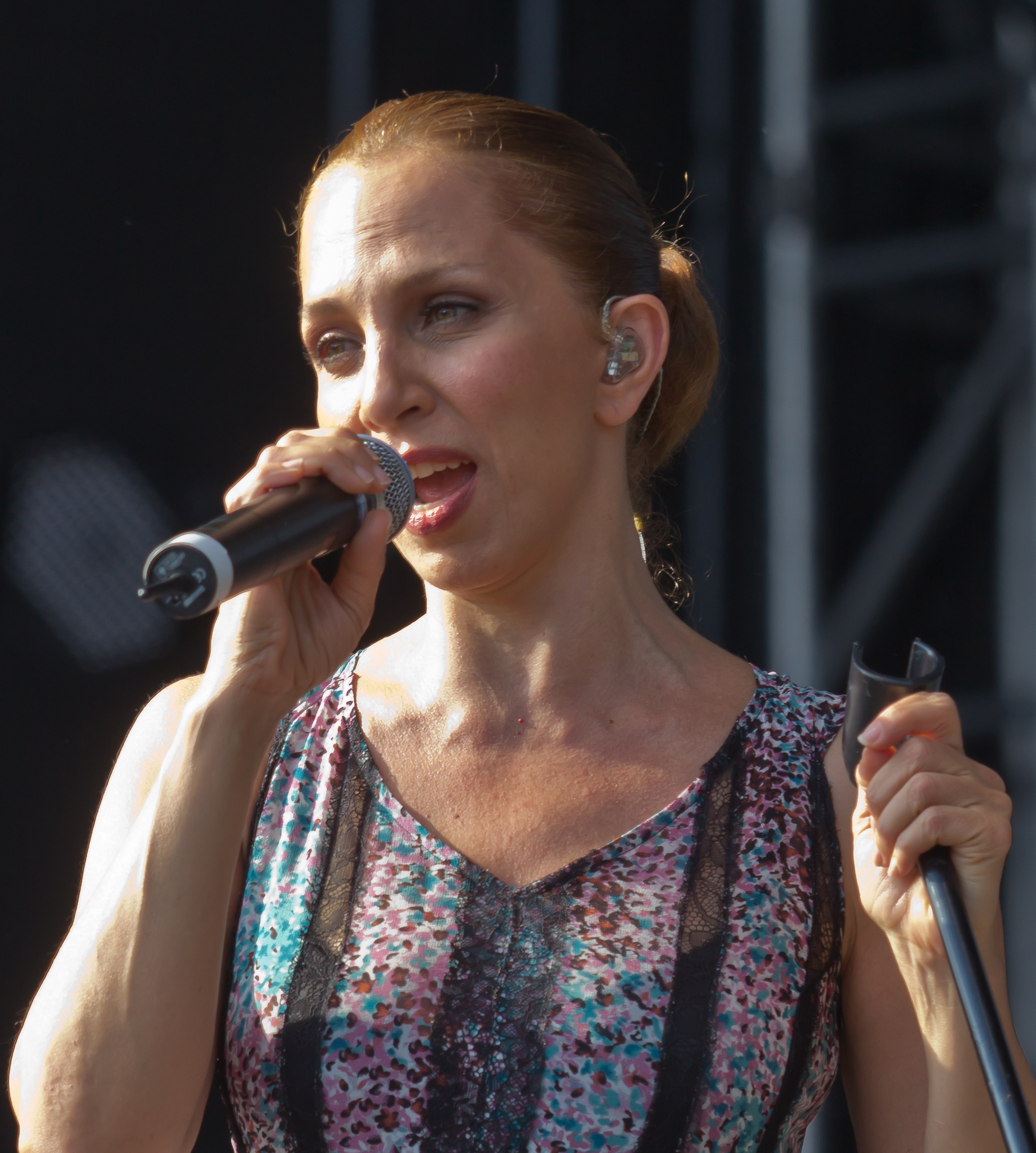 Die türkische Popmusik-Sängerin Sertab Erener während eines Konzertes in Köln, Deutschland.